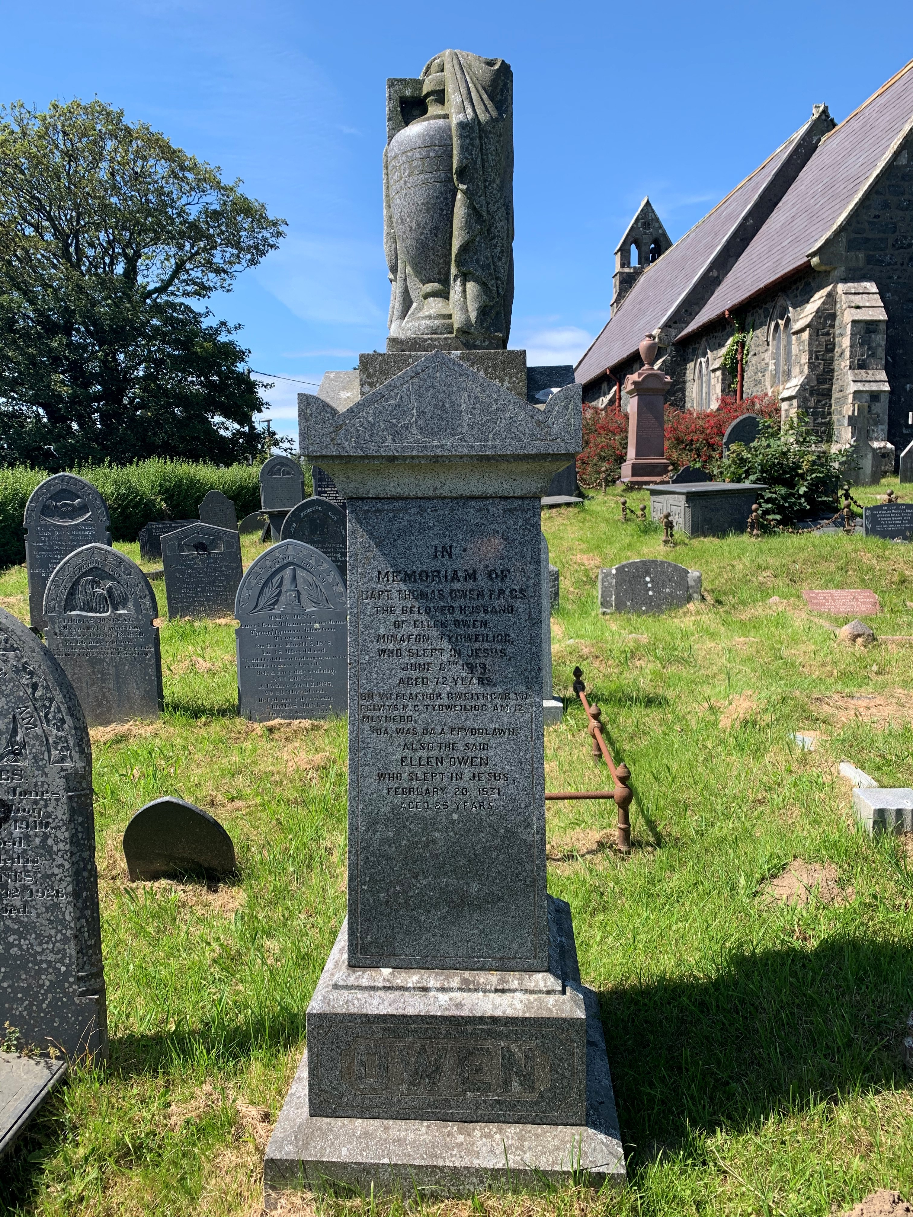 Carreg fedd Ellan a Thomas Owen ym mynwent Sant Cwyfan.